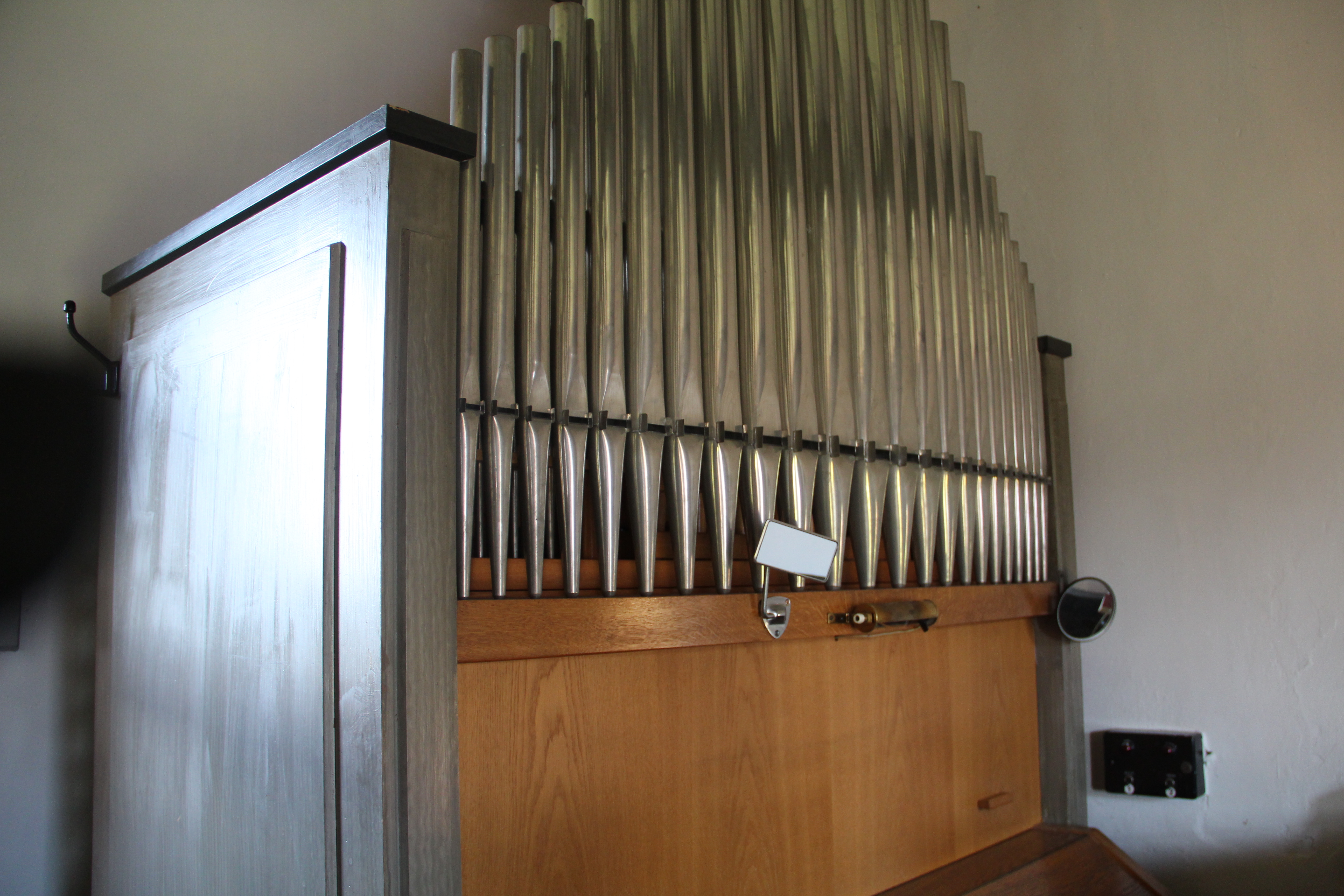 Oberwalgern